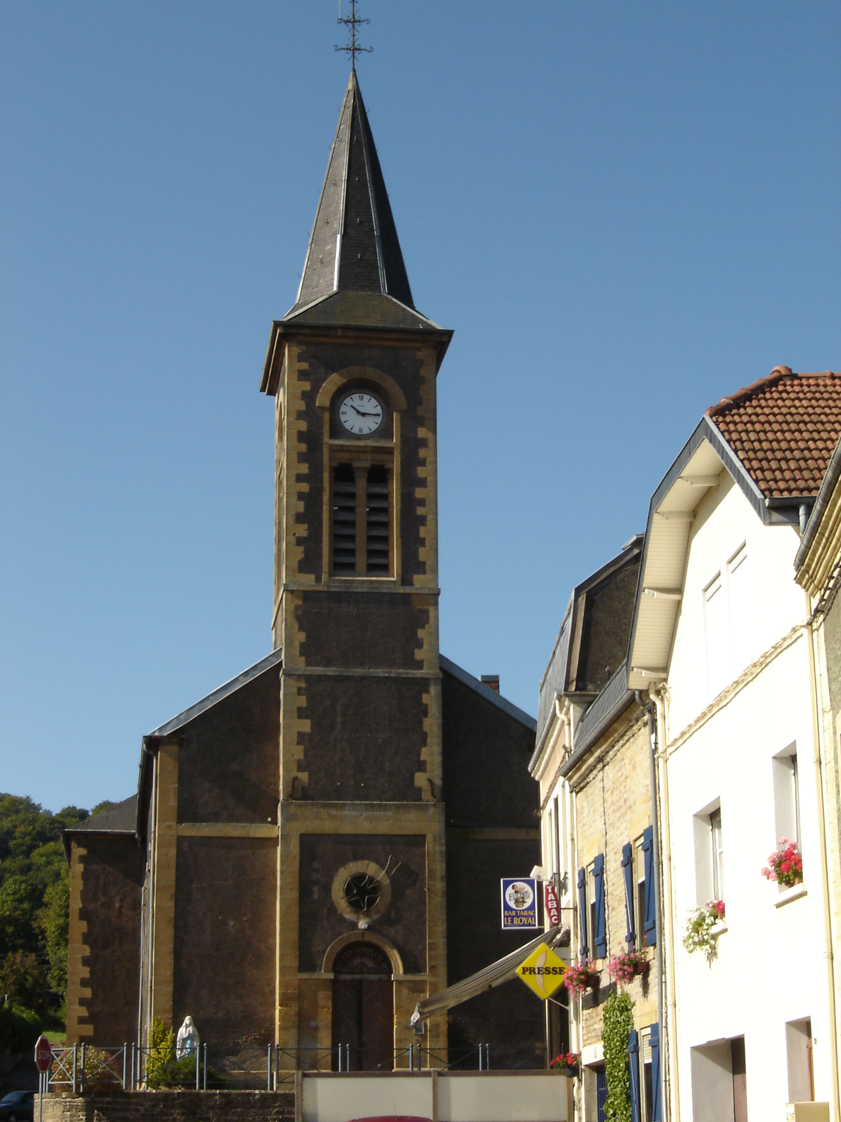 L'église de Gorcy.